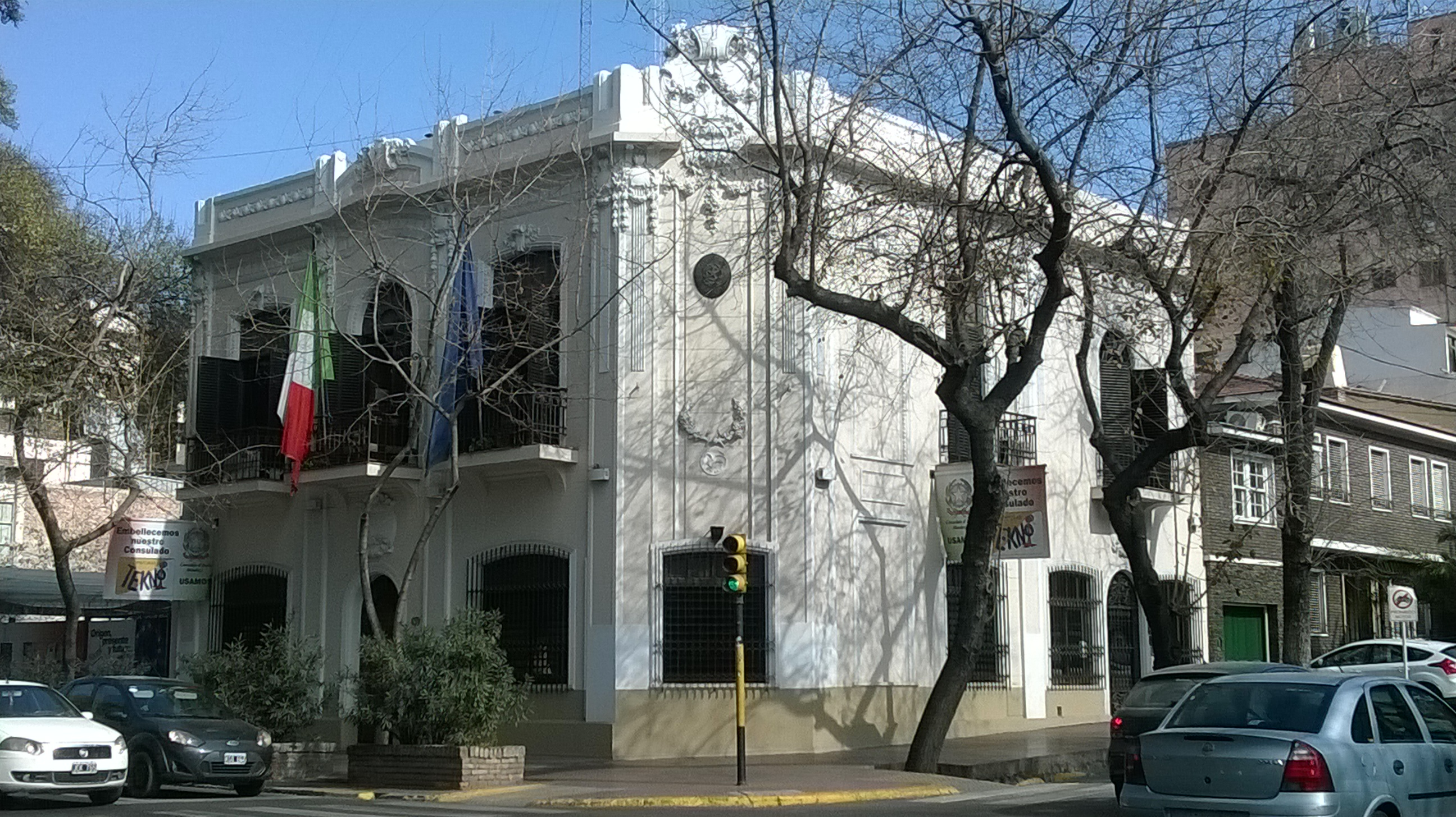 Consulado General de Italia para Cuyo